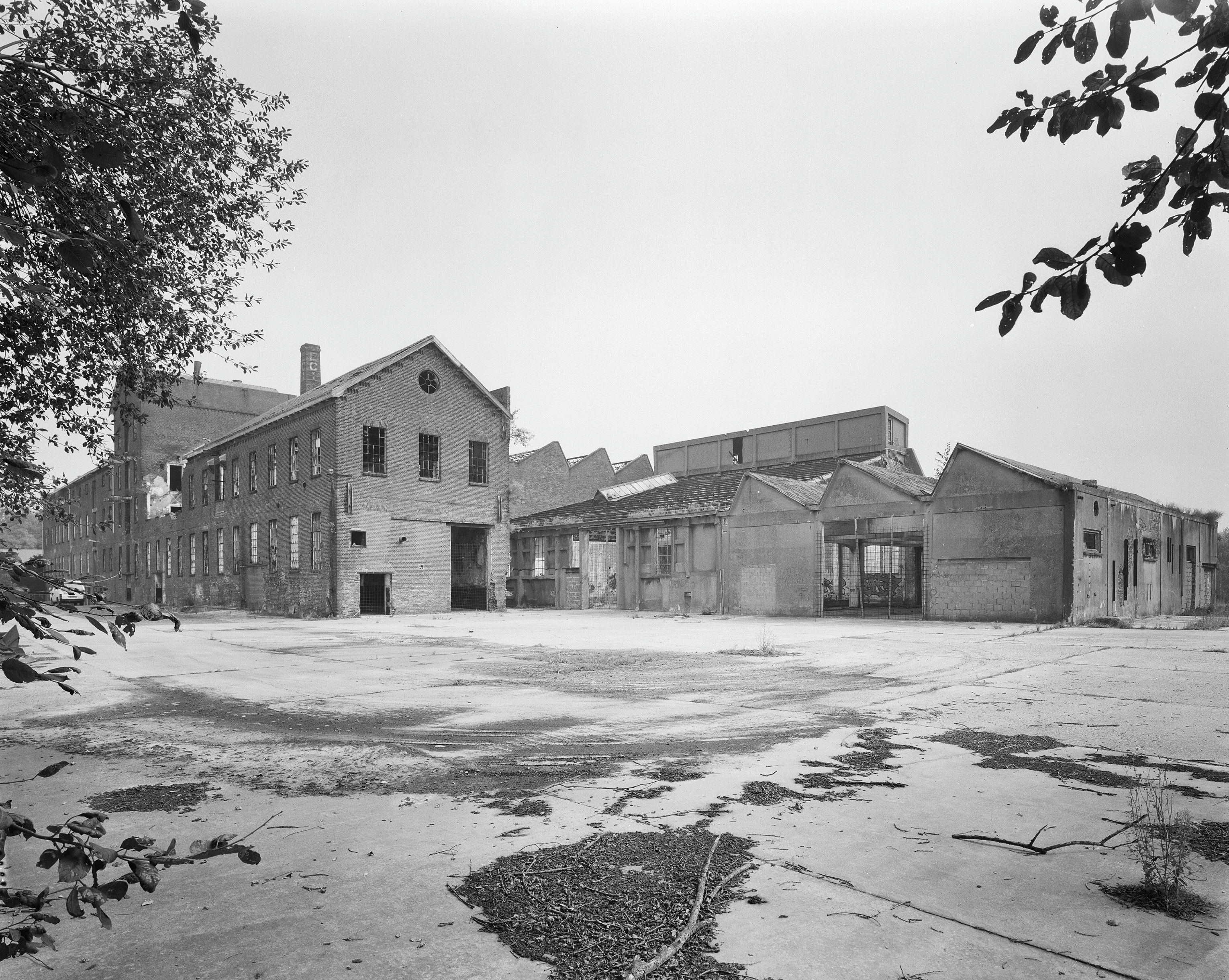 Voormalig Fabriekscomplex Eci (Electro Chemische Industrie): Overzicht fabrieksterrein